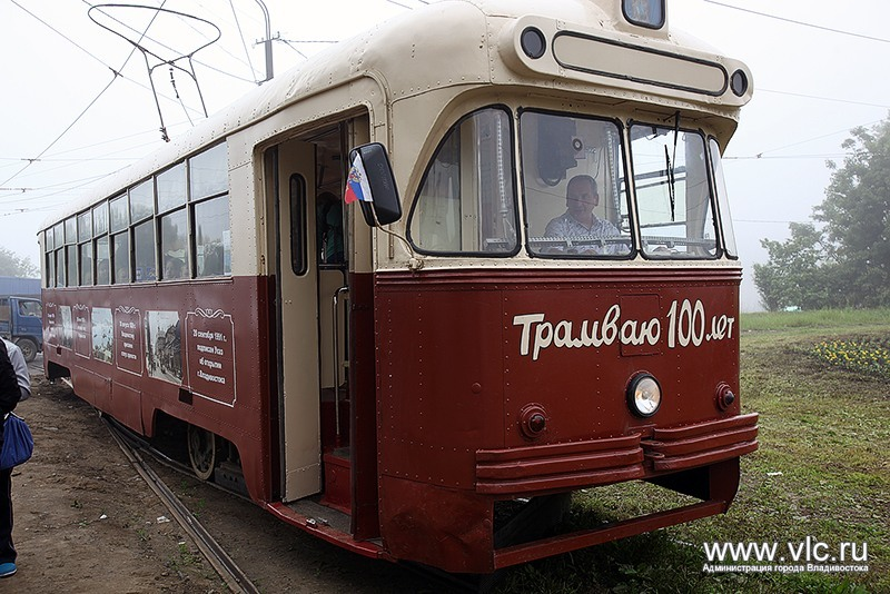 Трамвай РВЗ-6М2 № 221 во Владивостоке